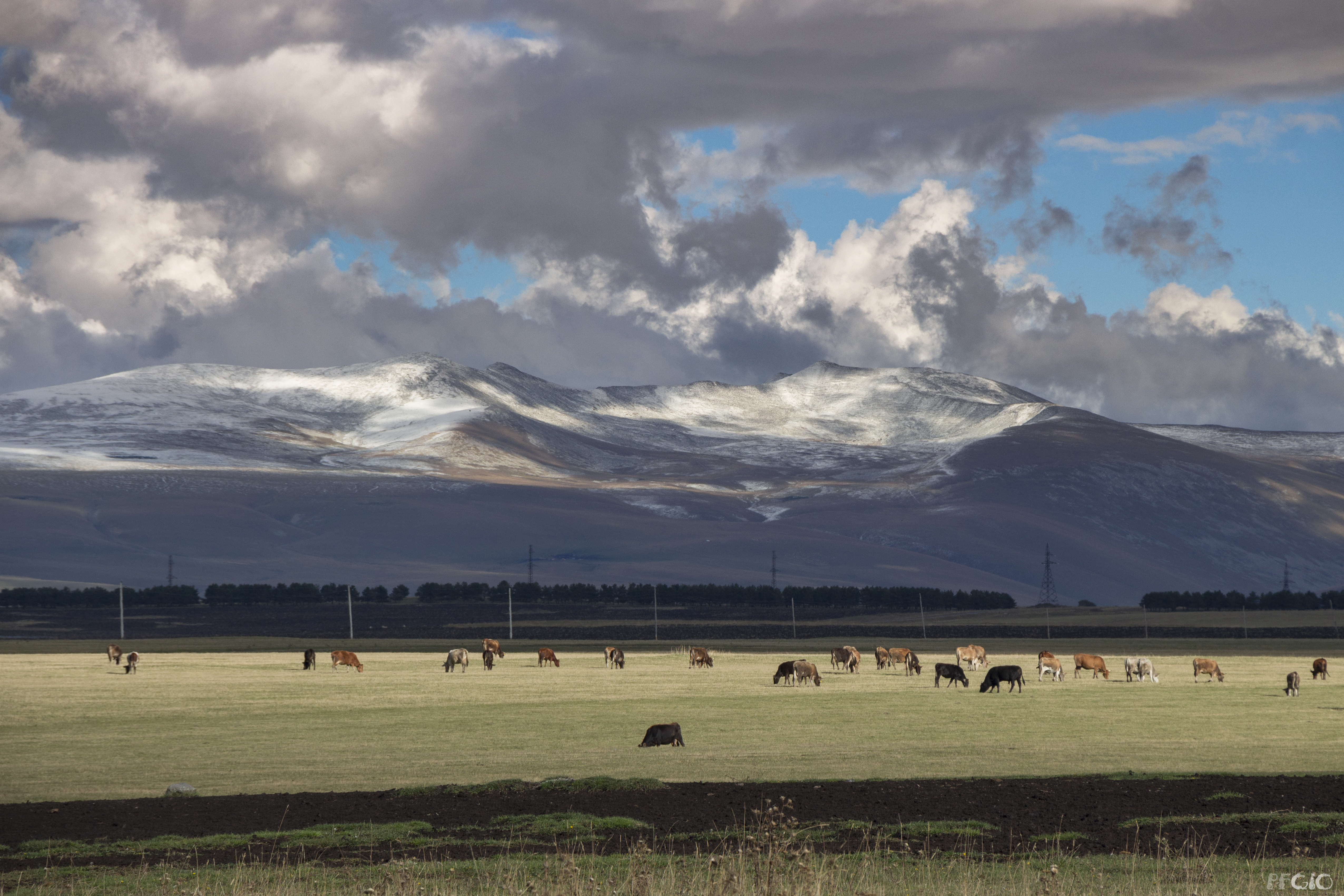 ჯავახეთის ეროვნული პარკი დაარსდა 2011 წელს. მდებარეობს სამხრეთ საქართველოში ჯავახეთის ზეგანზე. პარკის ფართობია 14200 ჰექტარი.